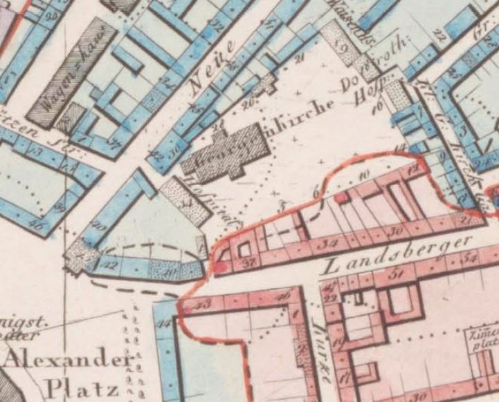 Berlin, Georgenkirchplatz im Jahre 1846